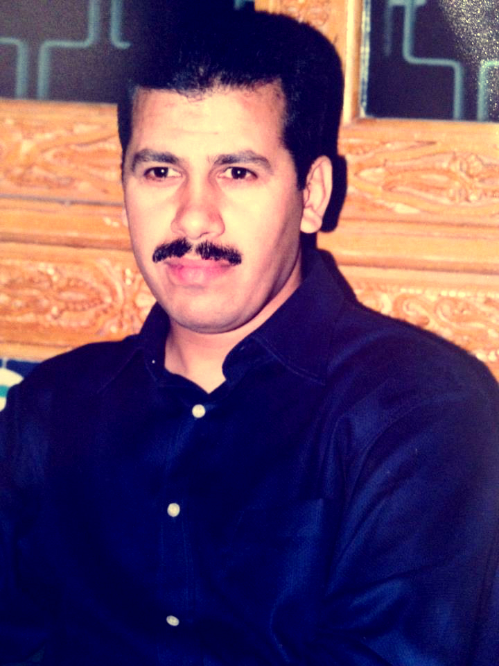 photo de mohamed asri